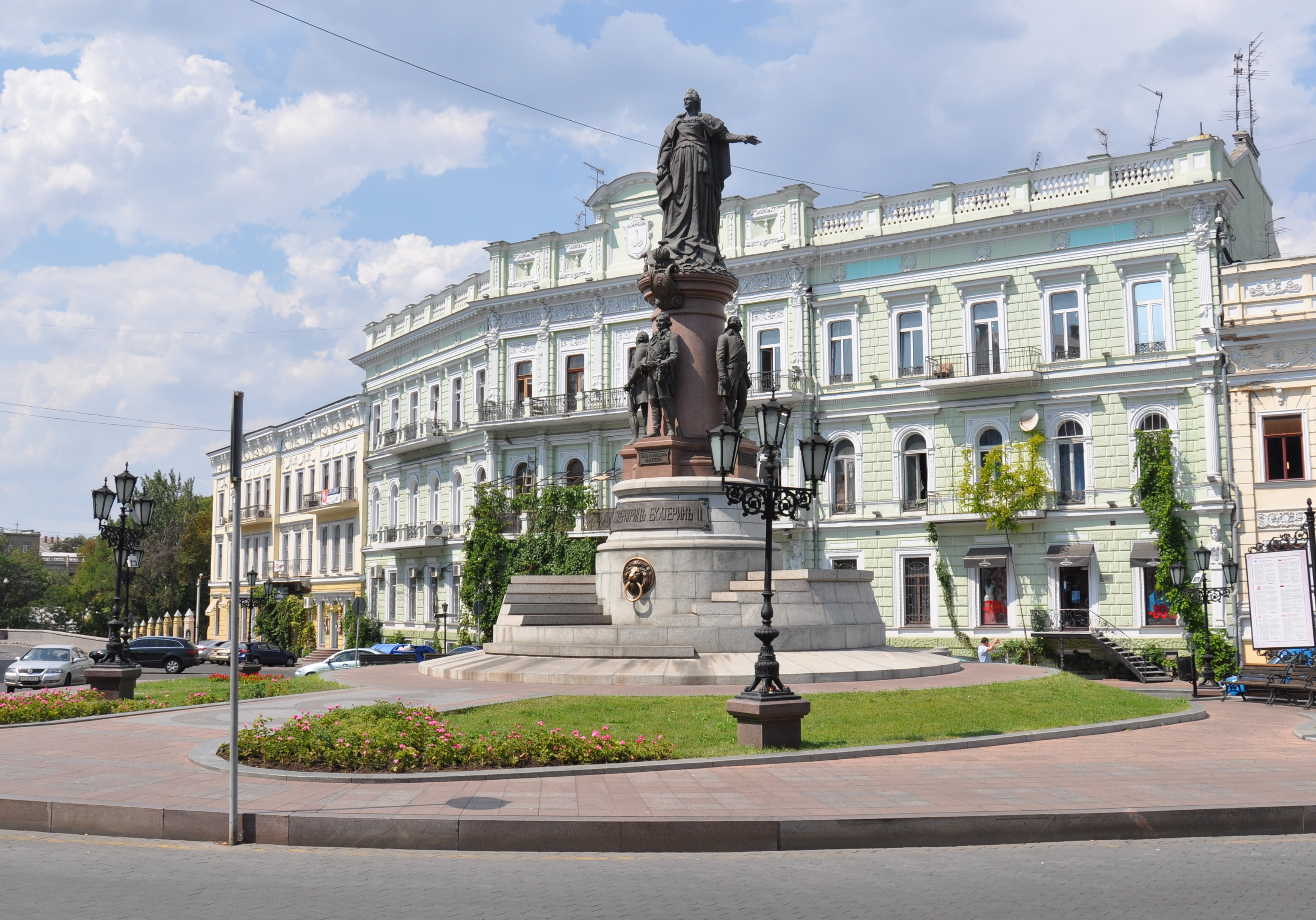 Екатерининская площадь. Памятник Основателям Одессы